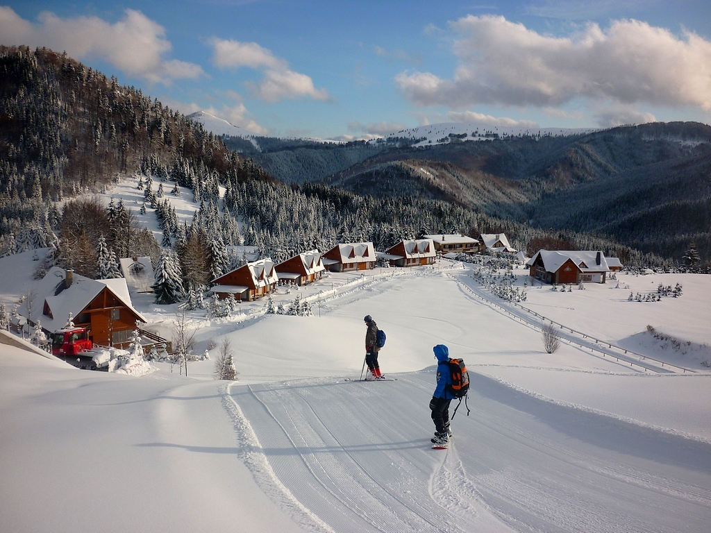 V rozprávke